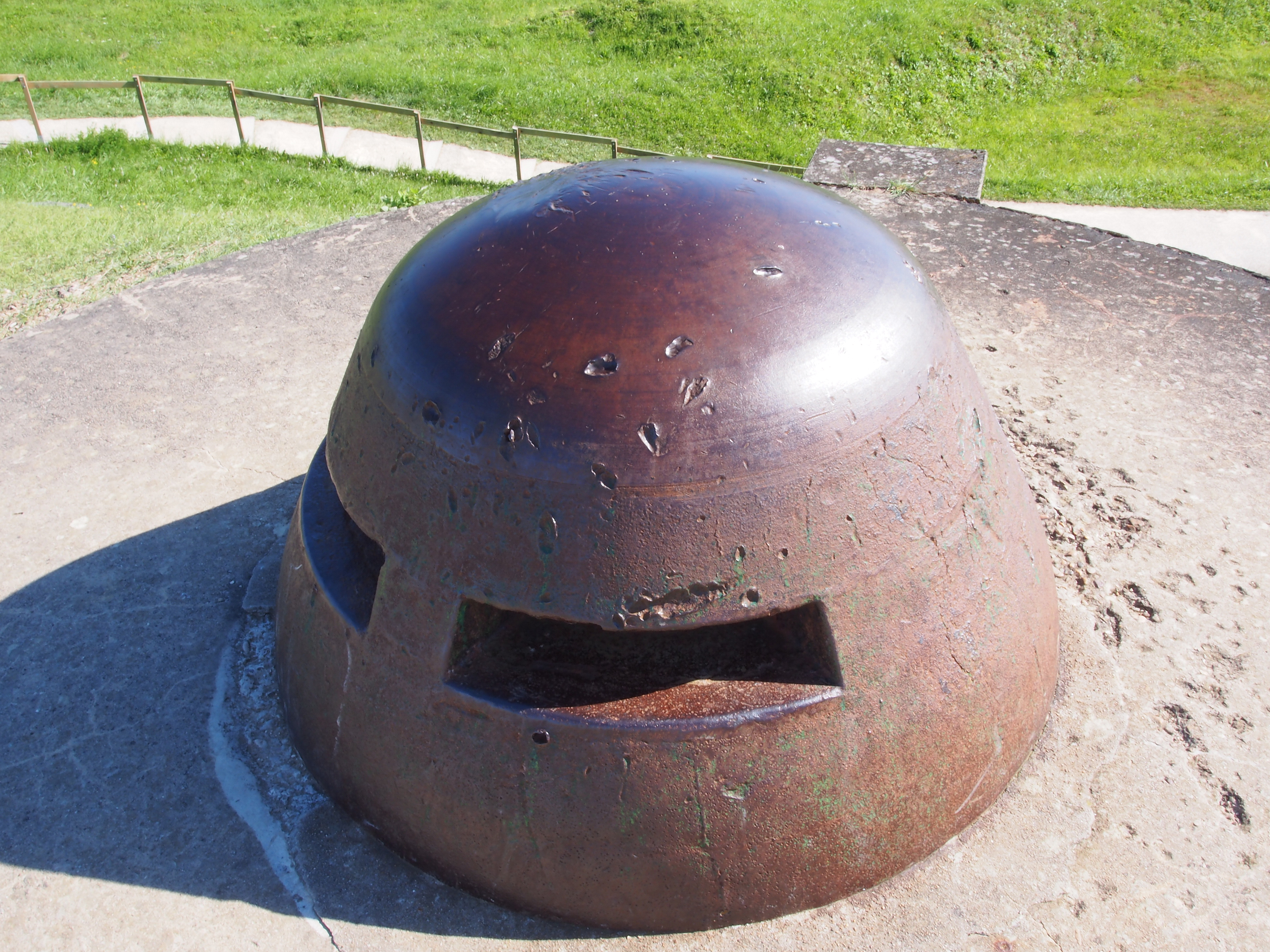 Fort de Douaumont, Kazemat